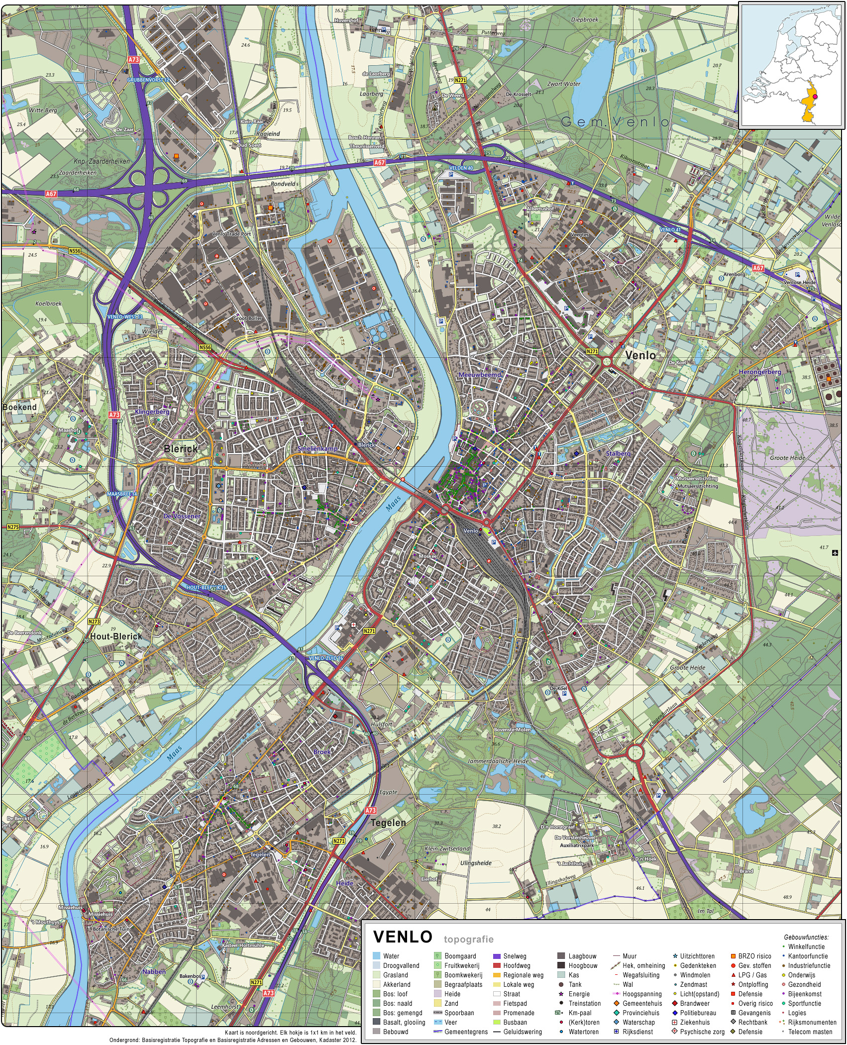 Topografisch beeld van de stad Venlo. Op basis van de GML open geodata van de BRT/Top10NL (basisregistratie Topografie, Kadaster 2012), vrijgegeven door Kadaster op 30-11-2012 onder de Creative Commons BY licentie. Gebouwvlakken vanuit Open Geodata BAG extract (december 2012). Samenstelling en kleurenschema: Jan-Willem van Aalst, met QuantumGIS en Photoshop.